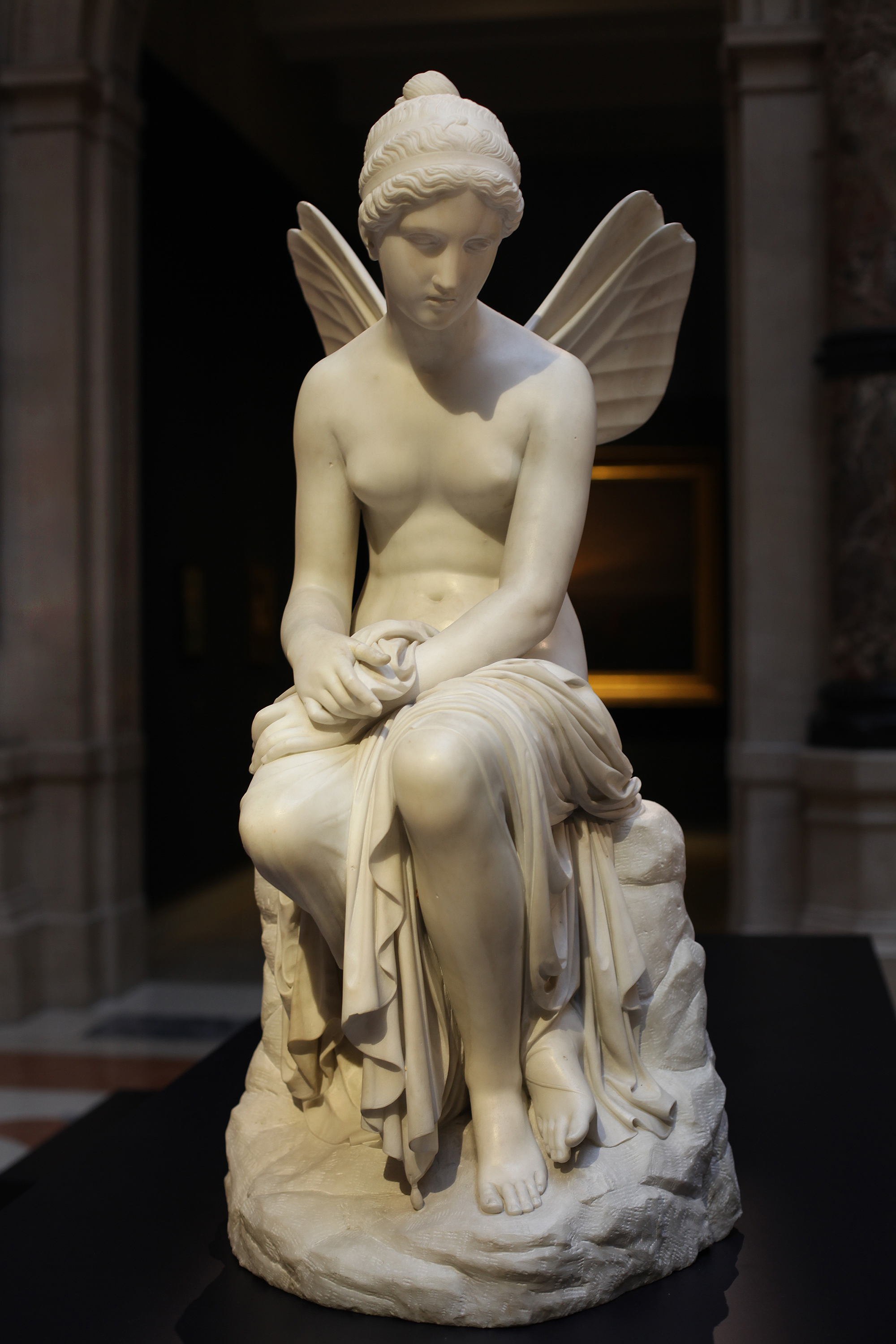 Pietro Tenerani (1789-1869) Psiche abbandonata (modello, 1816), Collezione Matarazzo di Licosa; fotografata alle Gallerie d'Italia di Milano, alla mostra Romanticismo, novembre 2018